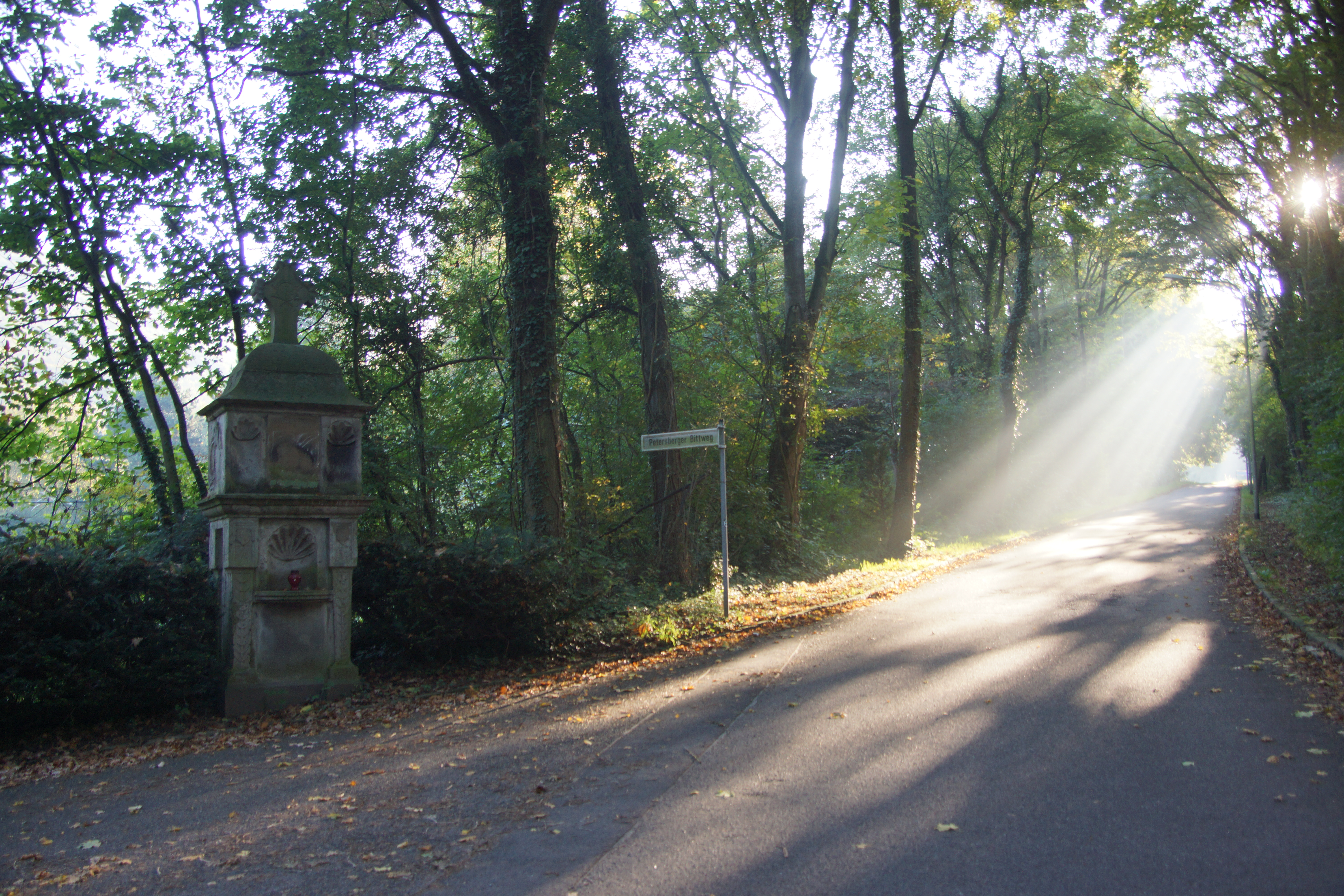 Petersberger Bittweg: Station 1, Ecke Am Lessing/Petersberger Bittweg